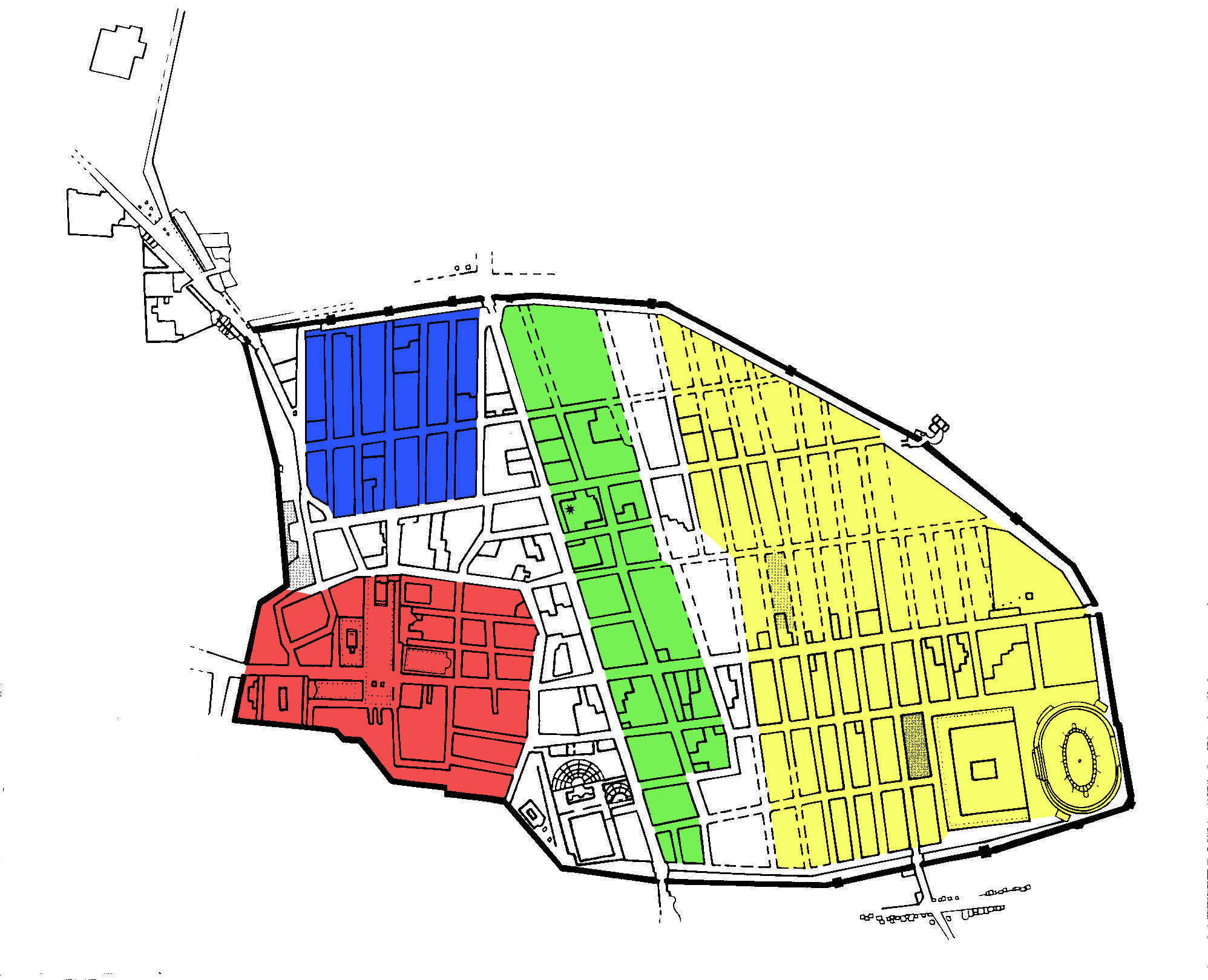 Pompeji: Besiedlungsphasen der Stadt